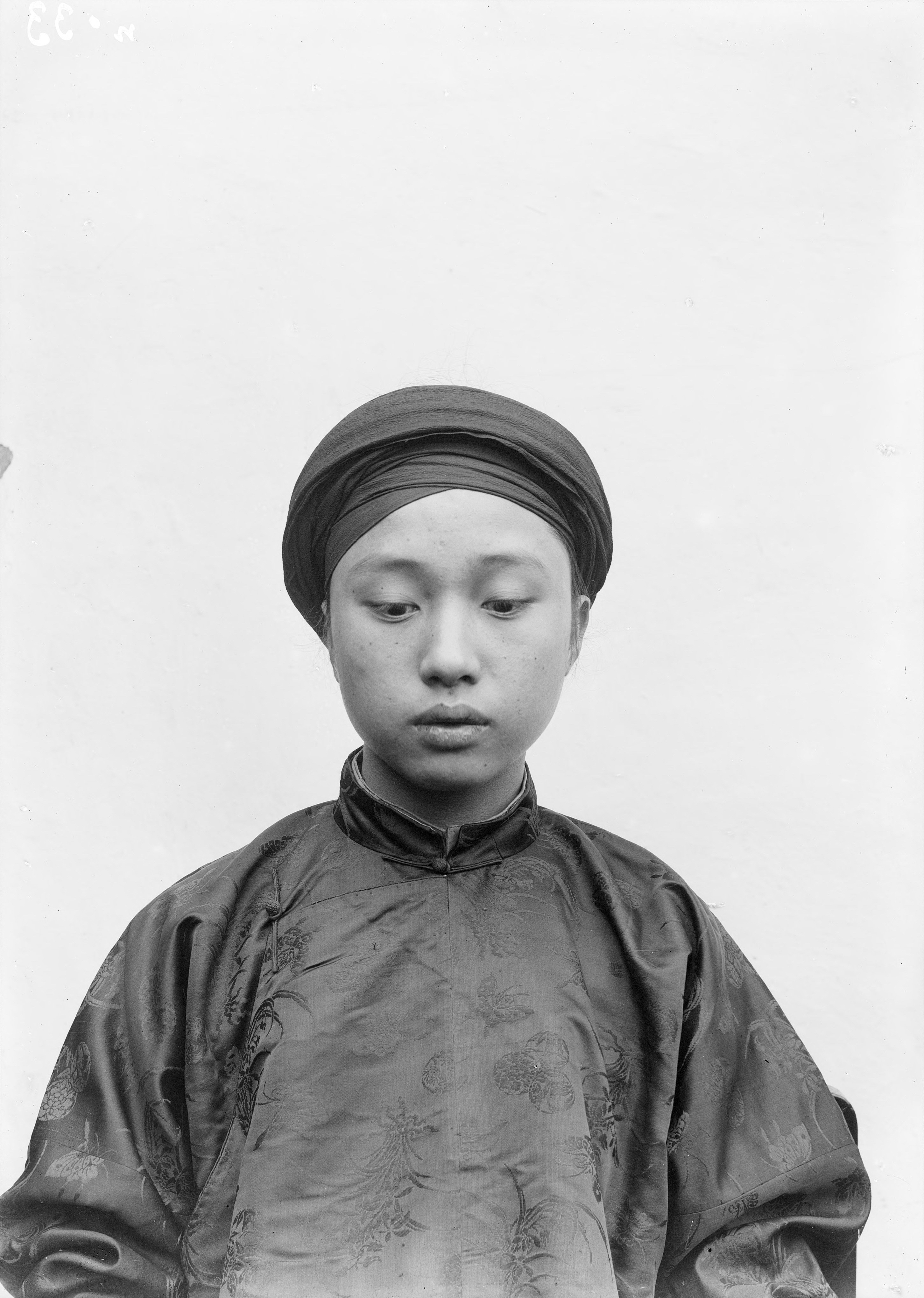 Vi Văn Định, con tổng đốc Lạng Sơn lúc 17 tuổi (1896). Cha người Việt (gia đình đã lập nghiệp tại vùng Lạng Sơn từ 200 năm nay), mẹ là người Thổ (Tày)